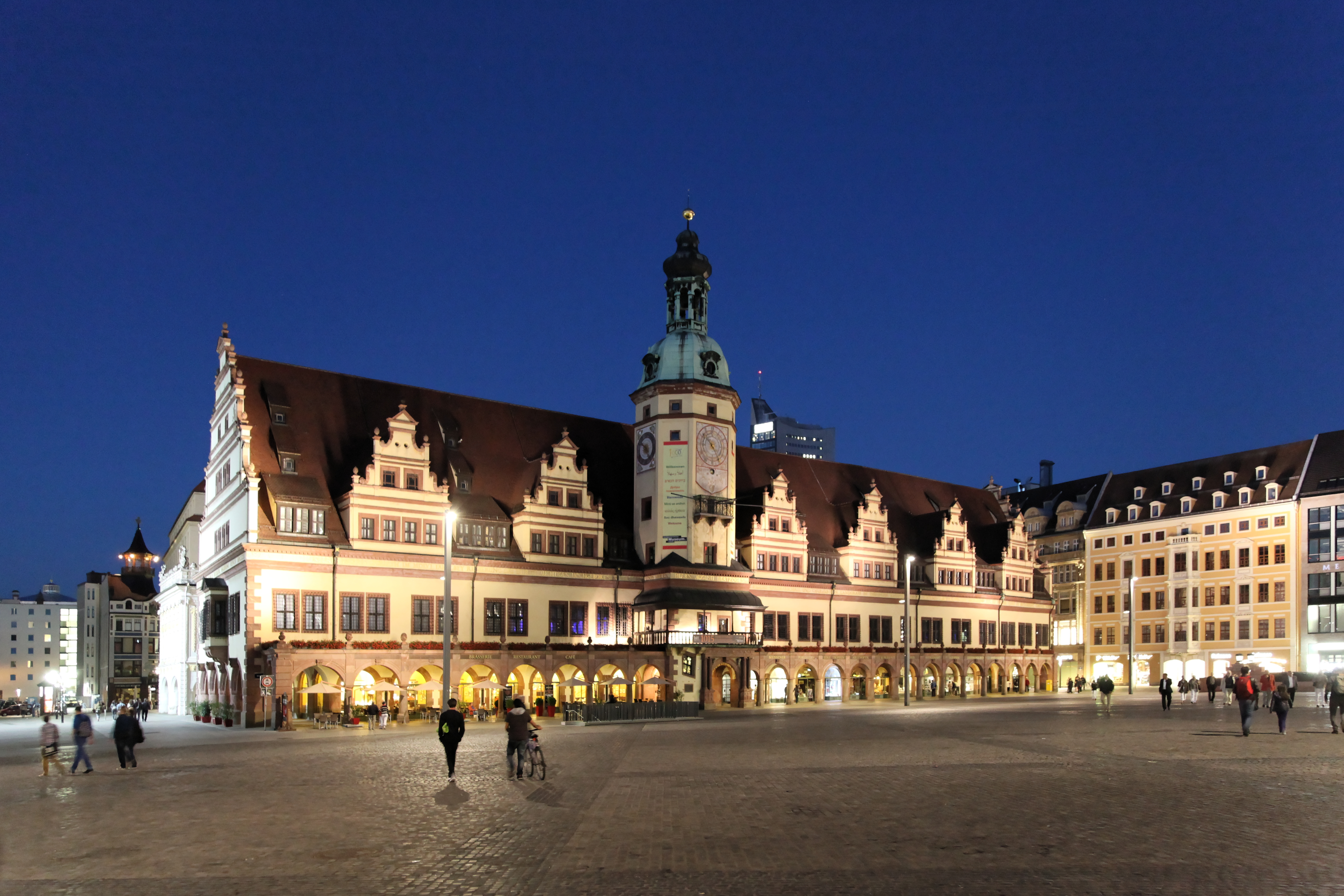 Altes Rathaus am Markt in Leipzig